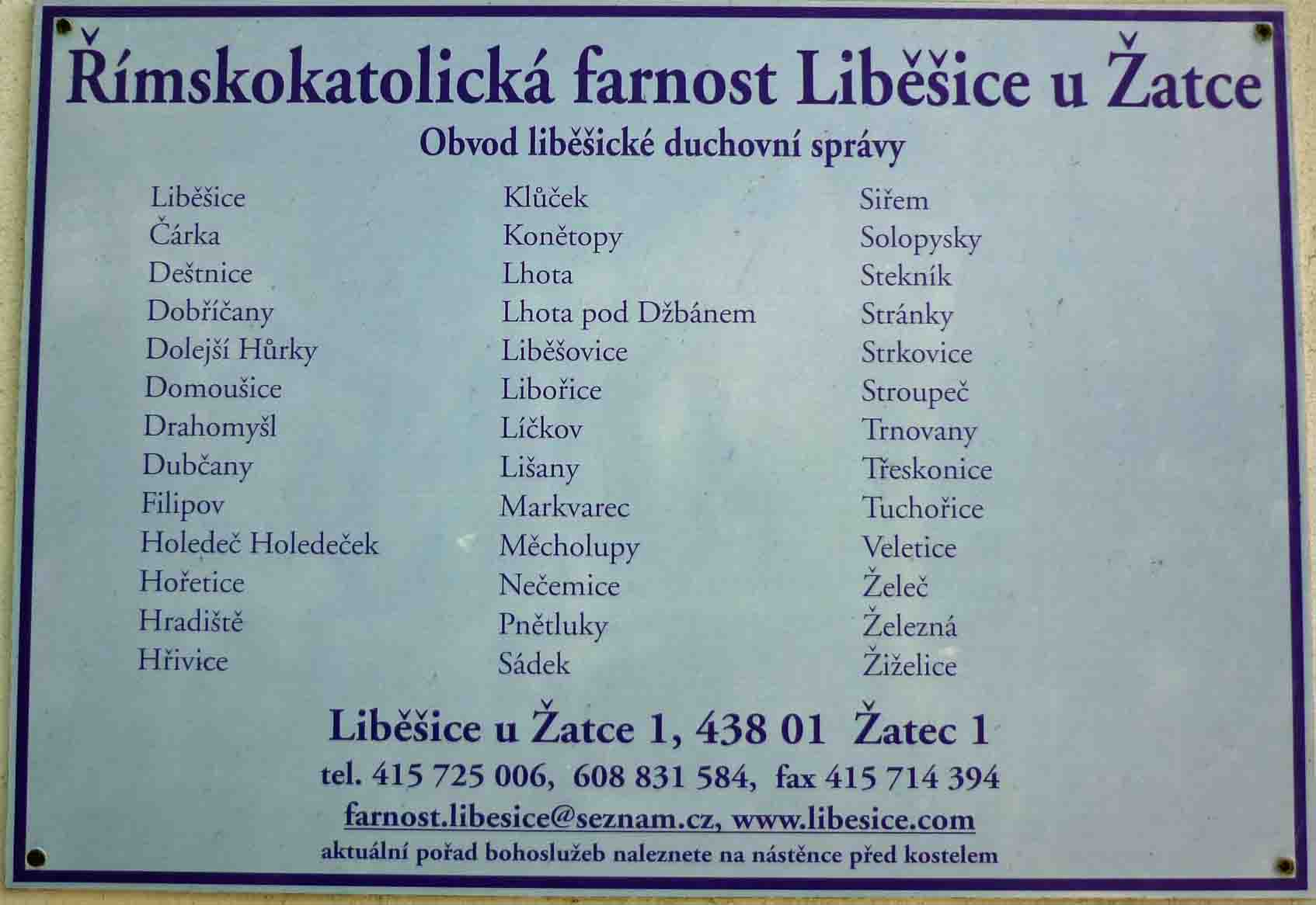 Tafel am Pfarrhaus in Liebeschitz (Liběšice) mit den Orten, die zur Pfarrei gehören